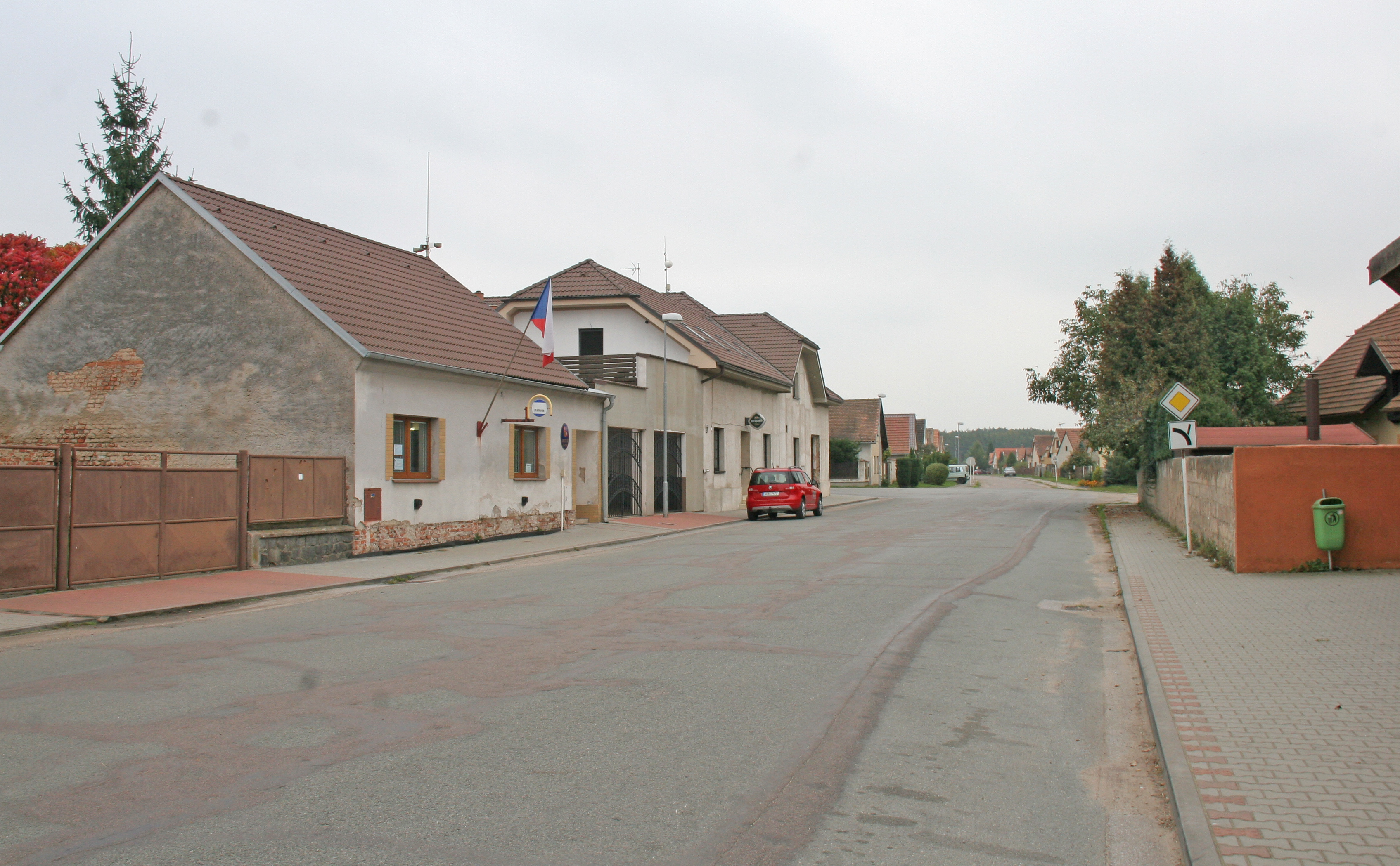 Hlavečník obecní úřad